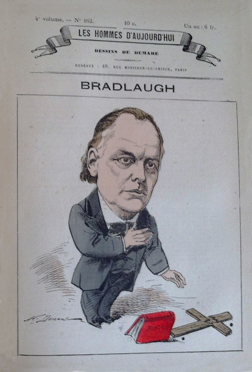 Bradlaugh (Charles Bradlaugh), caricature d'André Gill pour le n°162 Les Hommes d'aujourd'hui.